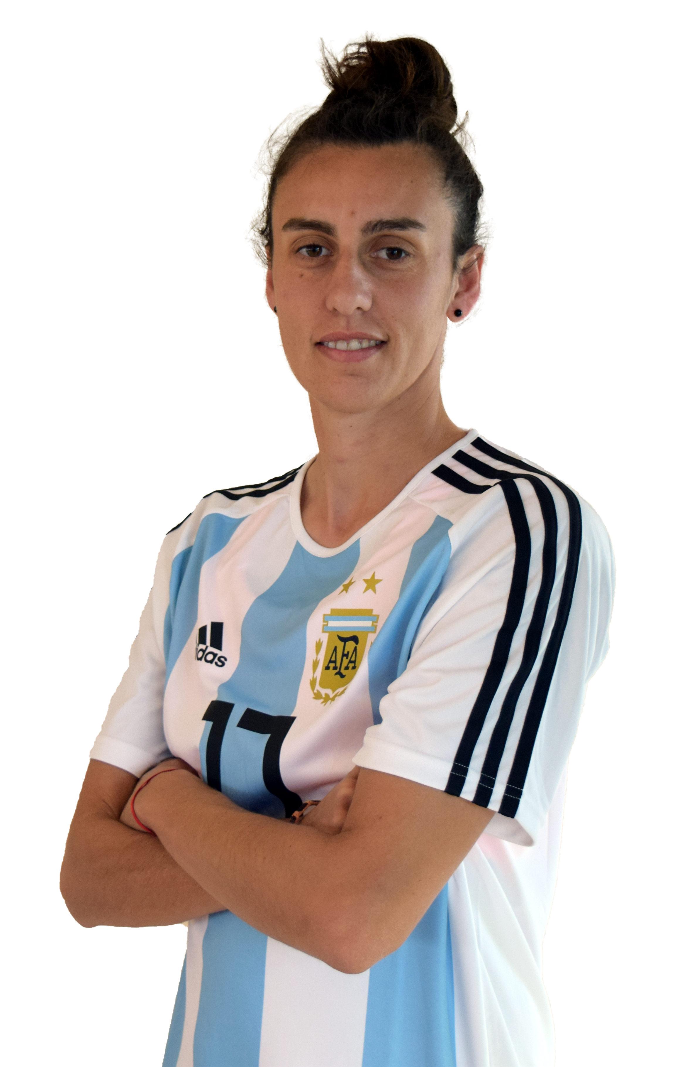 Belén Potassa, jugadora de la selección mayor femenina de fútbol de Argentina.Foto sacada previo al primer partido del repechaje por un lugar para el mundial de futbol femenino de Francia 2019